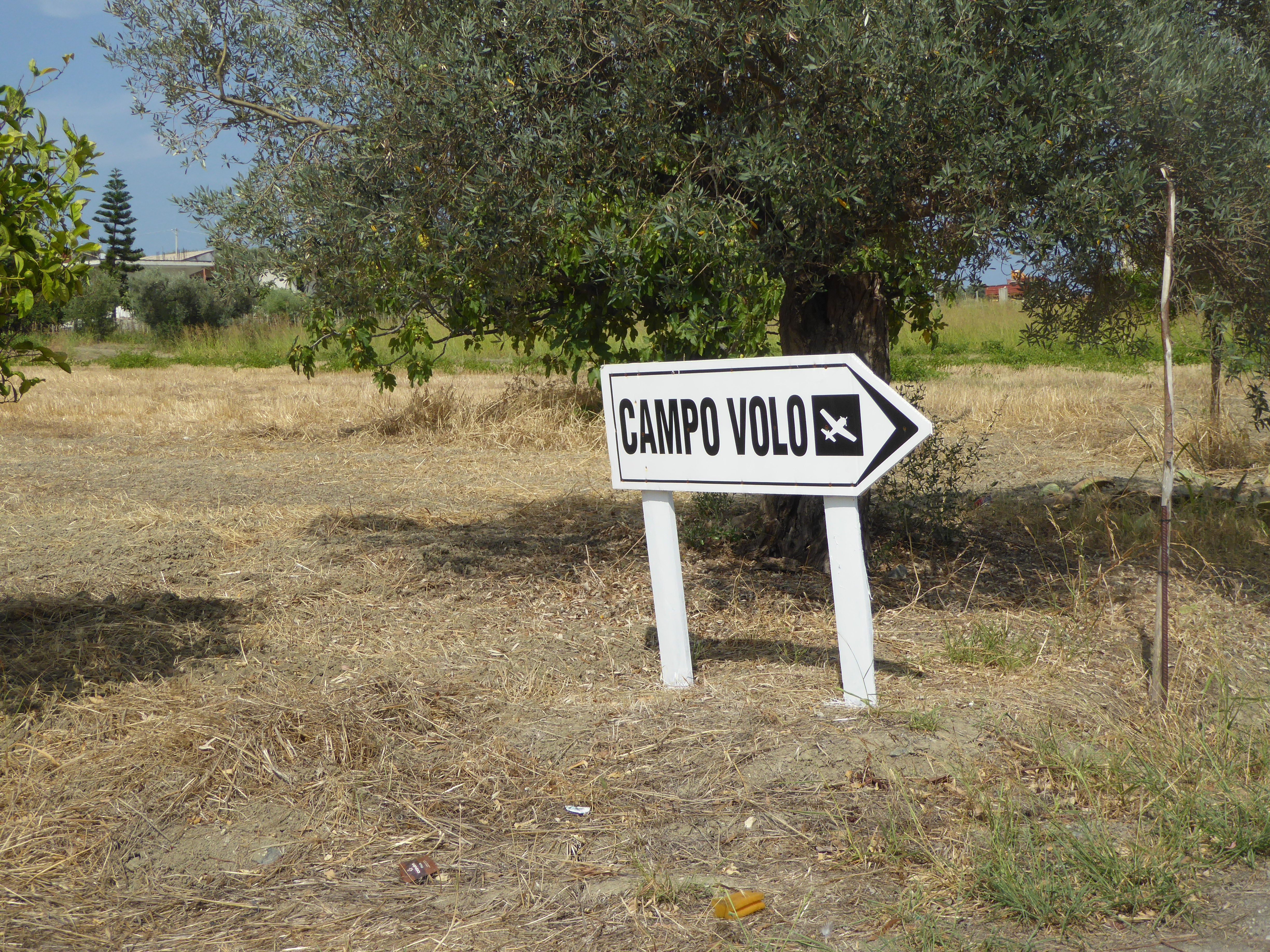 Insegna Campo Volo 2018 località Ellera